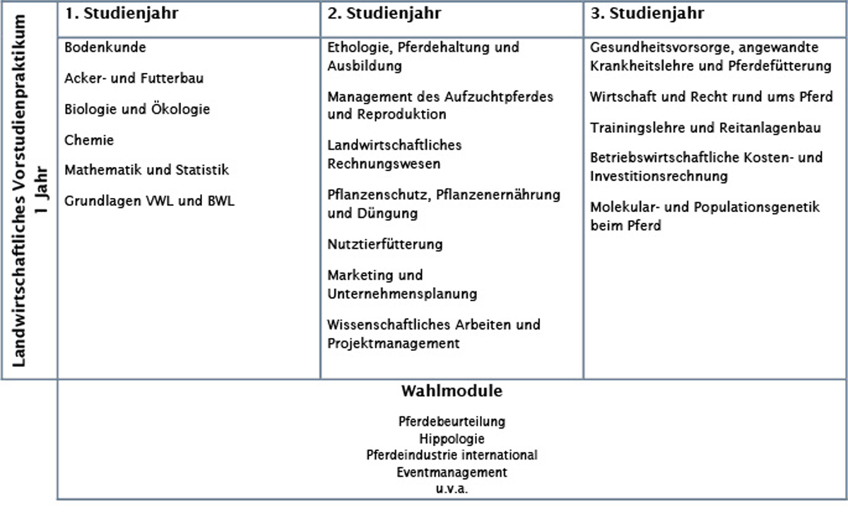 Modulplan BSc Agronomie mit Vertiefung Pferdewissenschaften an der Hochschule für Agrar-, Forst- und Lebensmittelwissenschaften HAFL